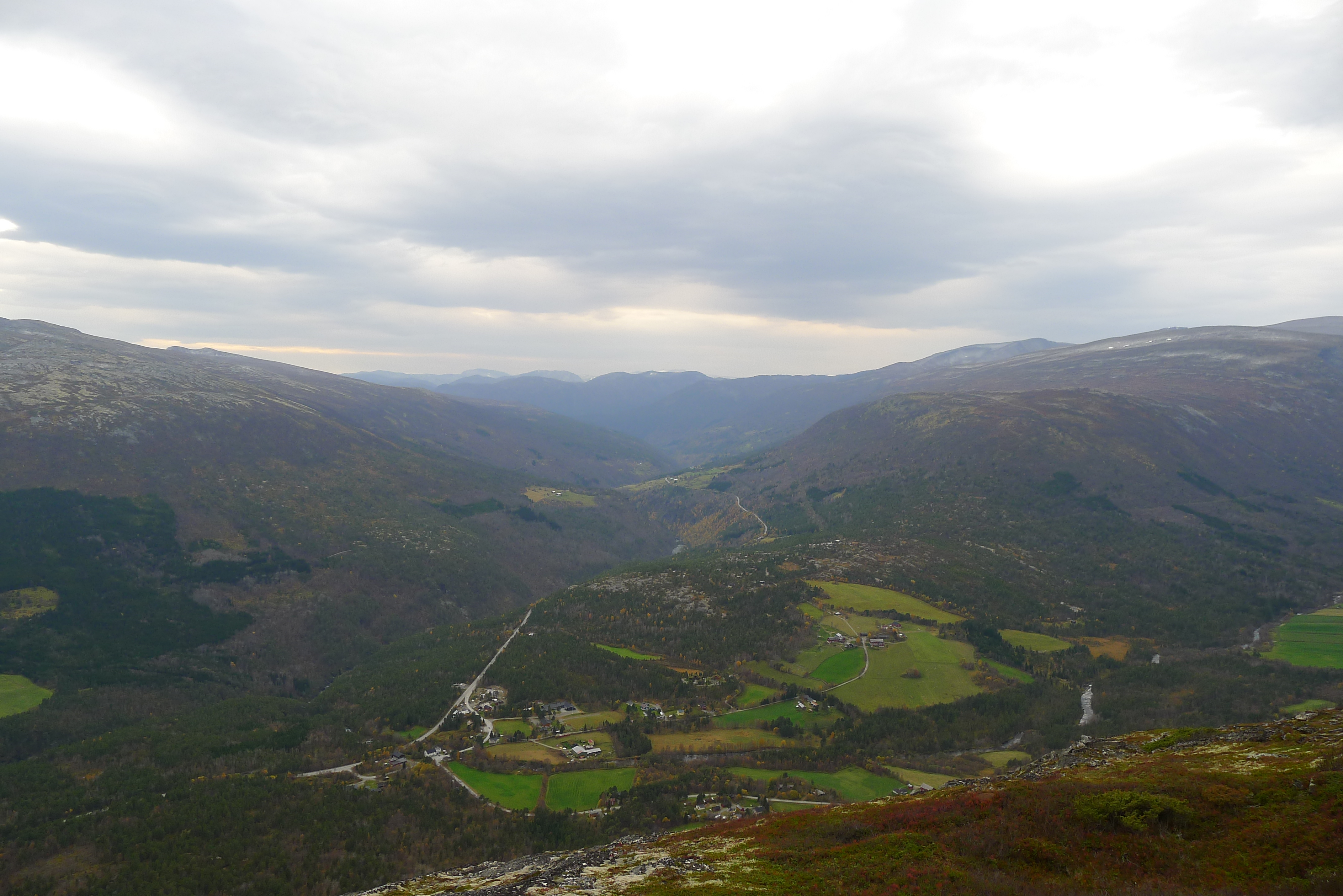 Agnordal Storlidalen møter dalføret Oppdal